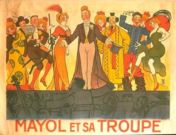 Affiche Mayol et sa troupe par Adrien Barrère, 120 X 158 cm. Exposition Proust, l'écriture et les arts, musée d'Orsay, Paris 1999.